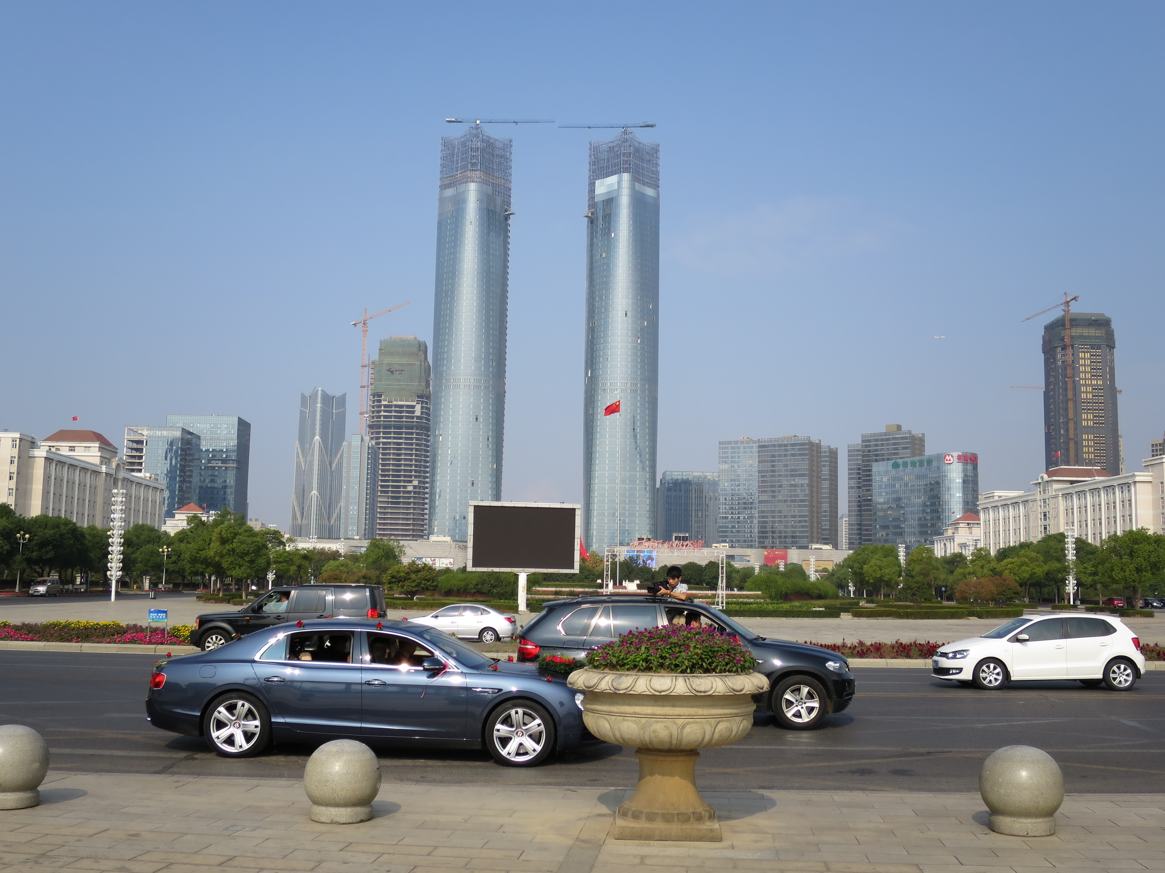 Nanchang